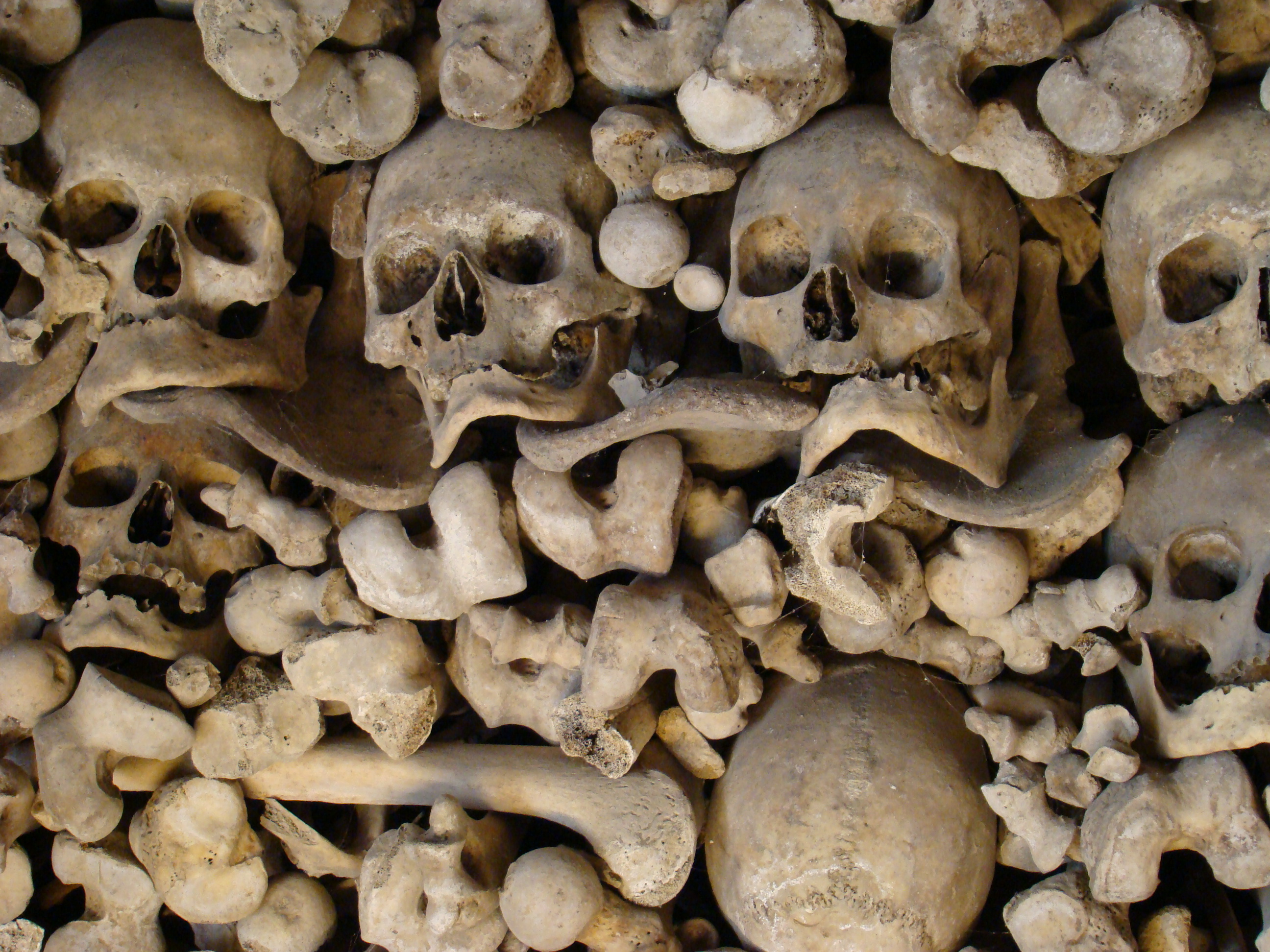 Iglesia de Wamba en la provincia de Valladolid, España. Osario con esqueletos desde el siglo XIII al XVIII.